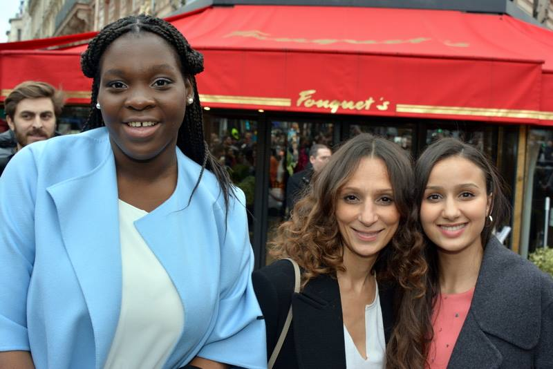 Déborah Lukumuena, Houda Benyamina et Oulaya Amamra au déjeuner des nommés des César du cinéma.